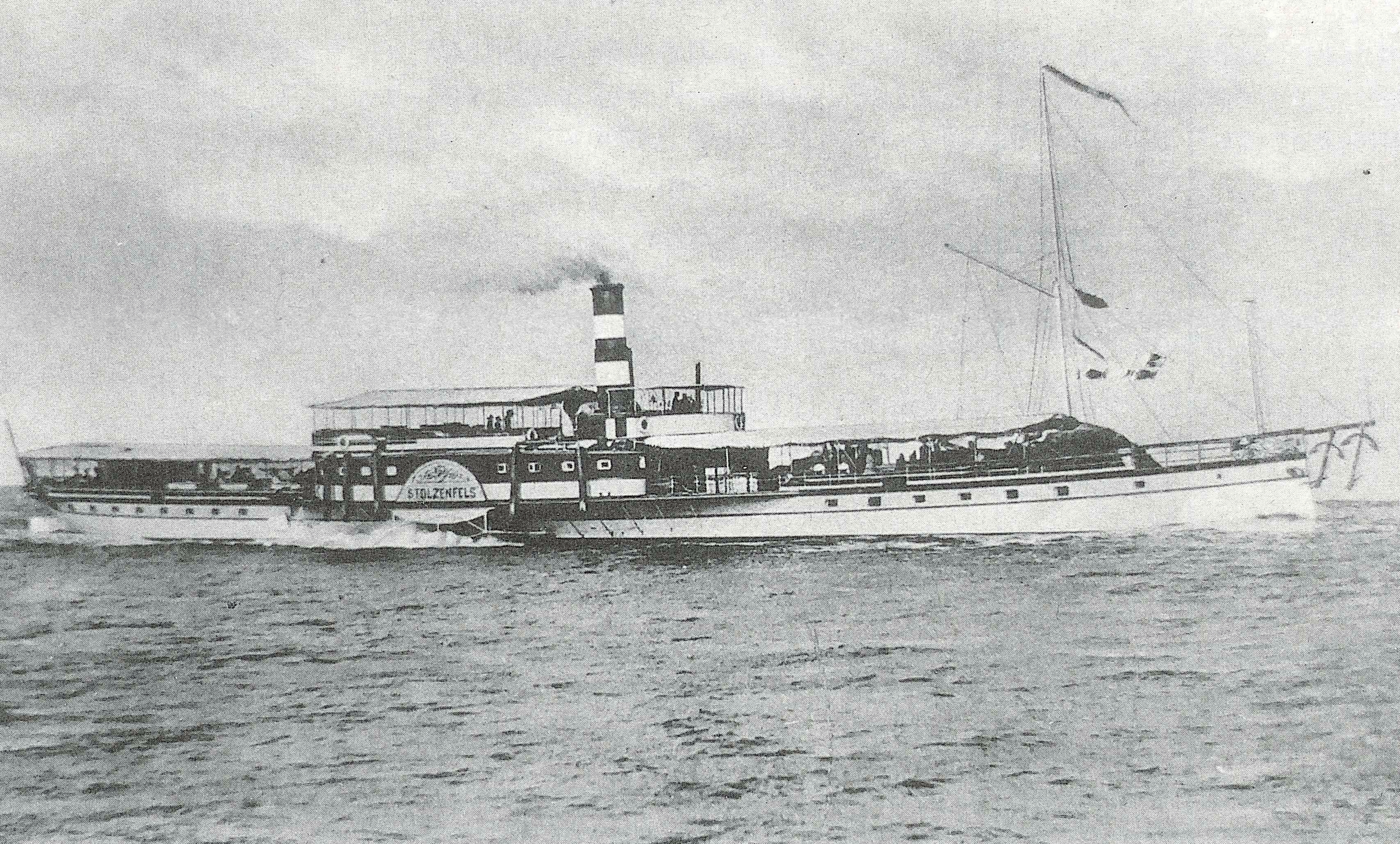 Der Raddampfer Stolzenfels im Jahre 2012